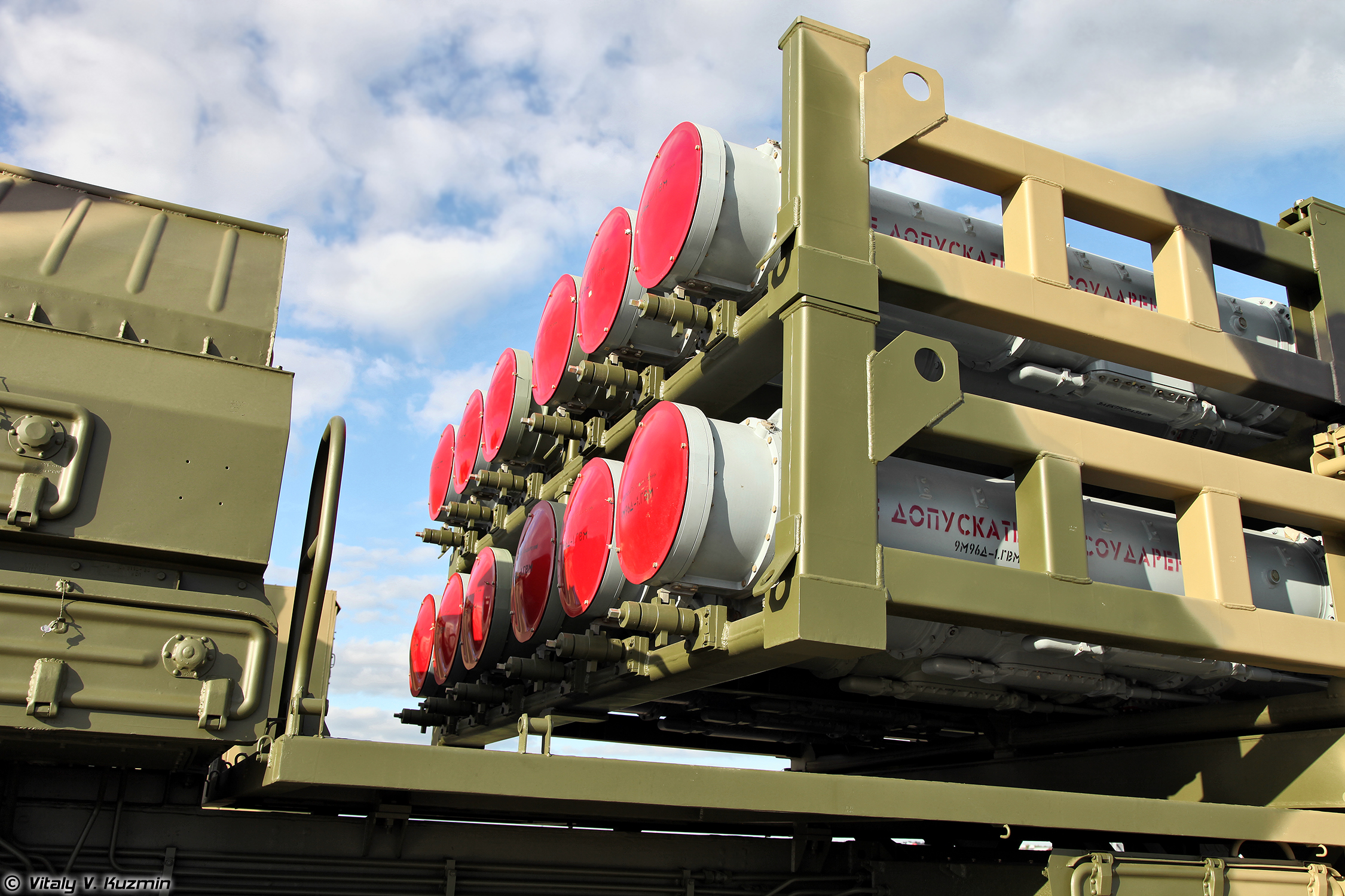 Пусковая установка 50П6Е (50P6E transporter erector launcher)